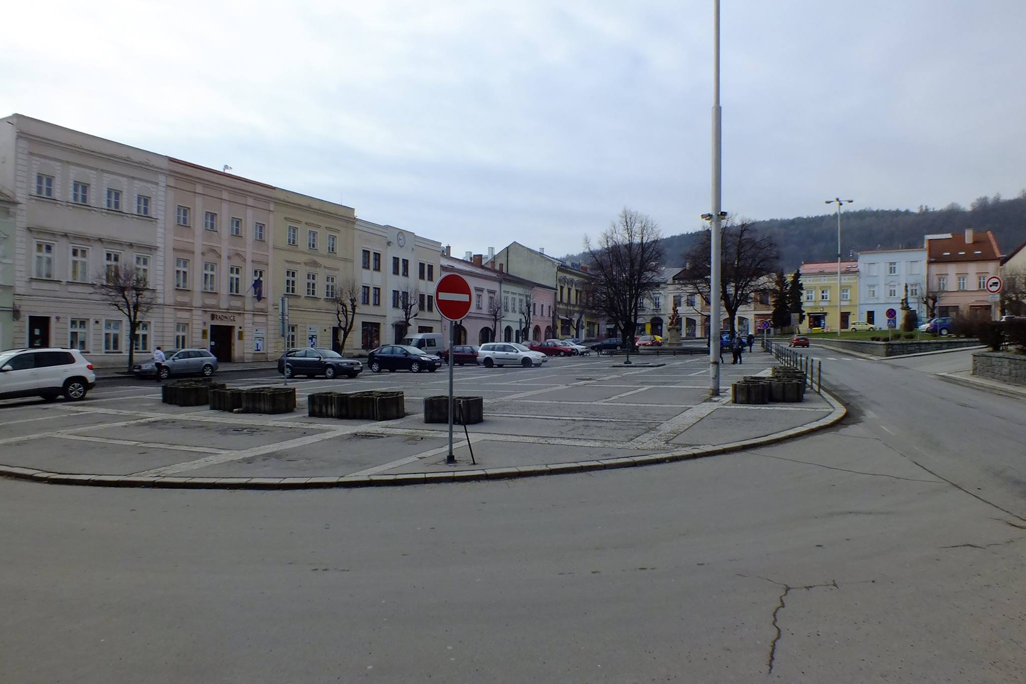 Hlavní náměstí v Odrách